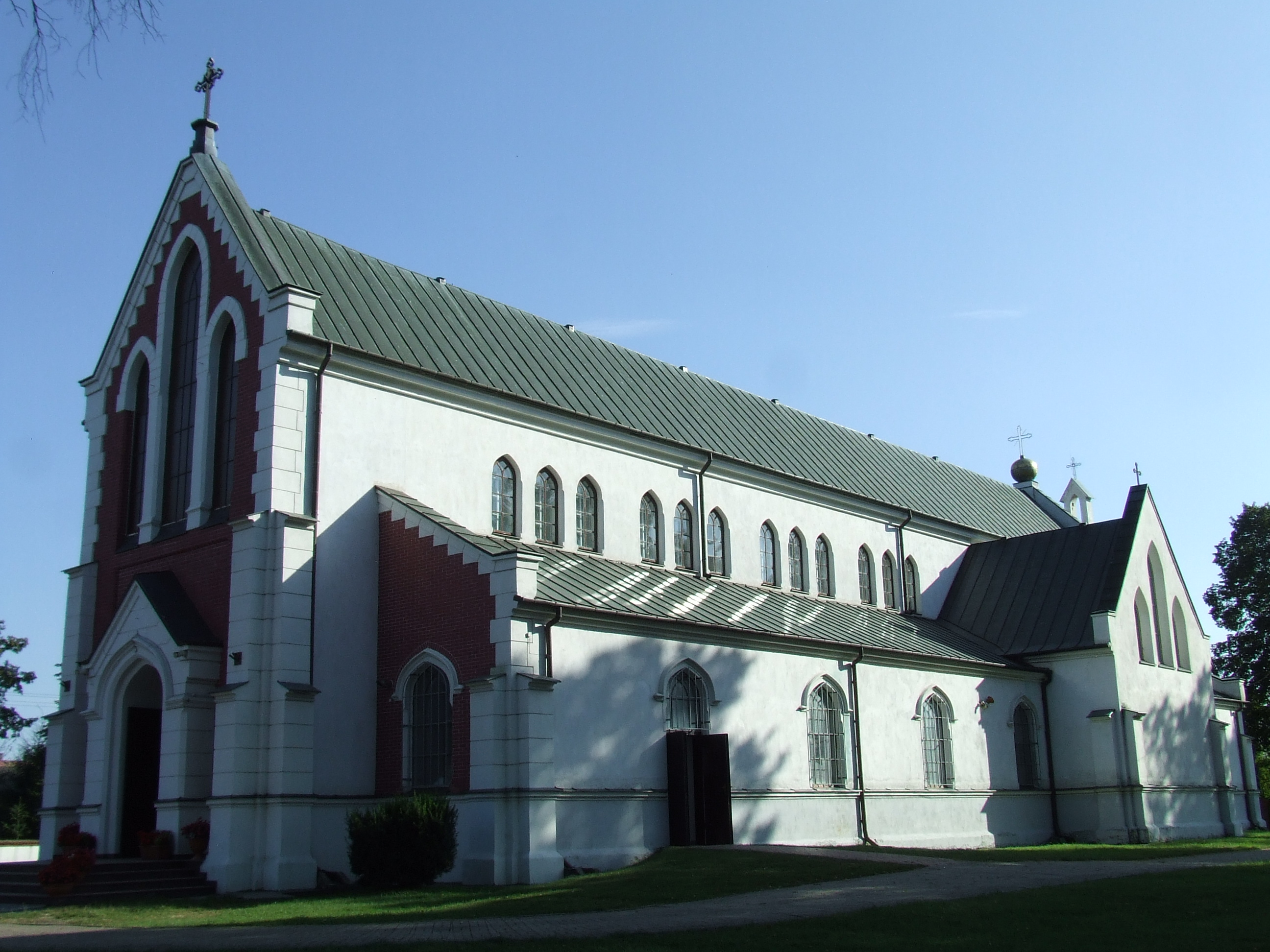 kościół- cmentarz rzymskokatolicki kościół parafialny murowany, zbudowany w latach 1819-1821, rozbudowany w 1881 r. Maciejowice, Maciejowice